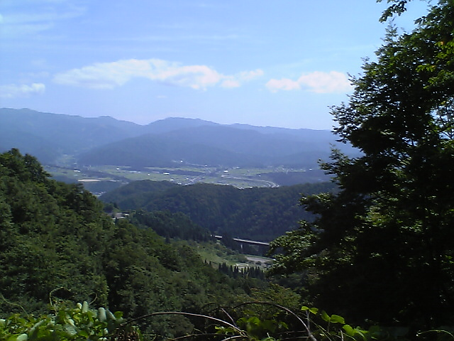 油坂隧道より白鳥町の眺望